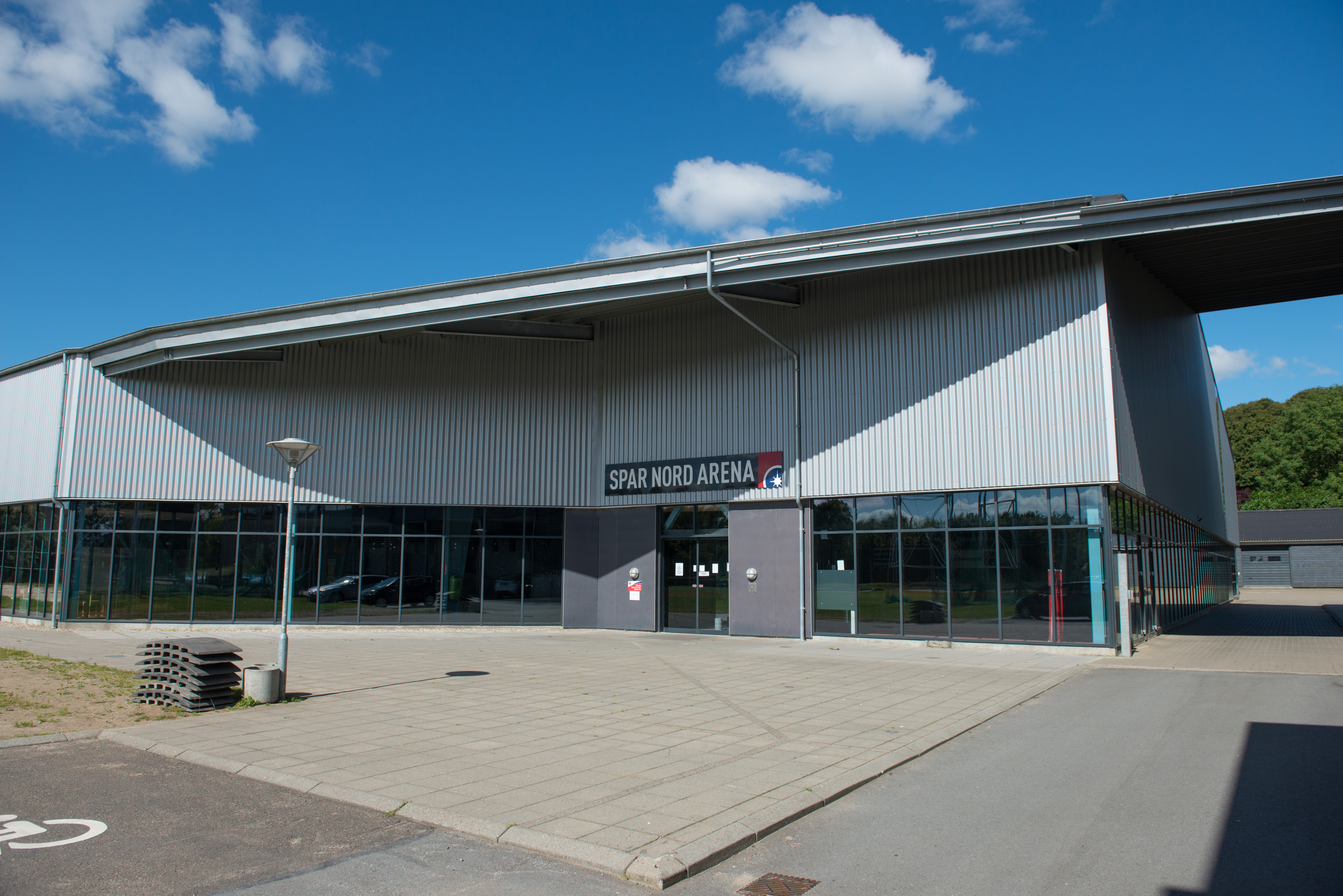 Billede er taget af Gunner Sørensen